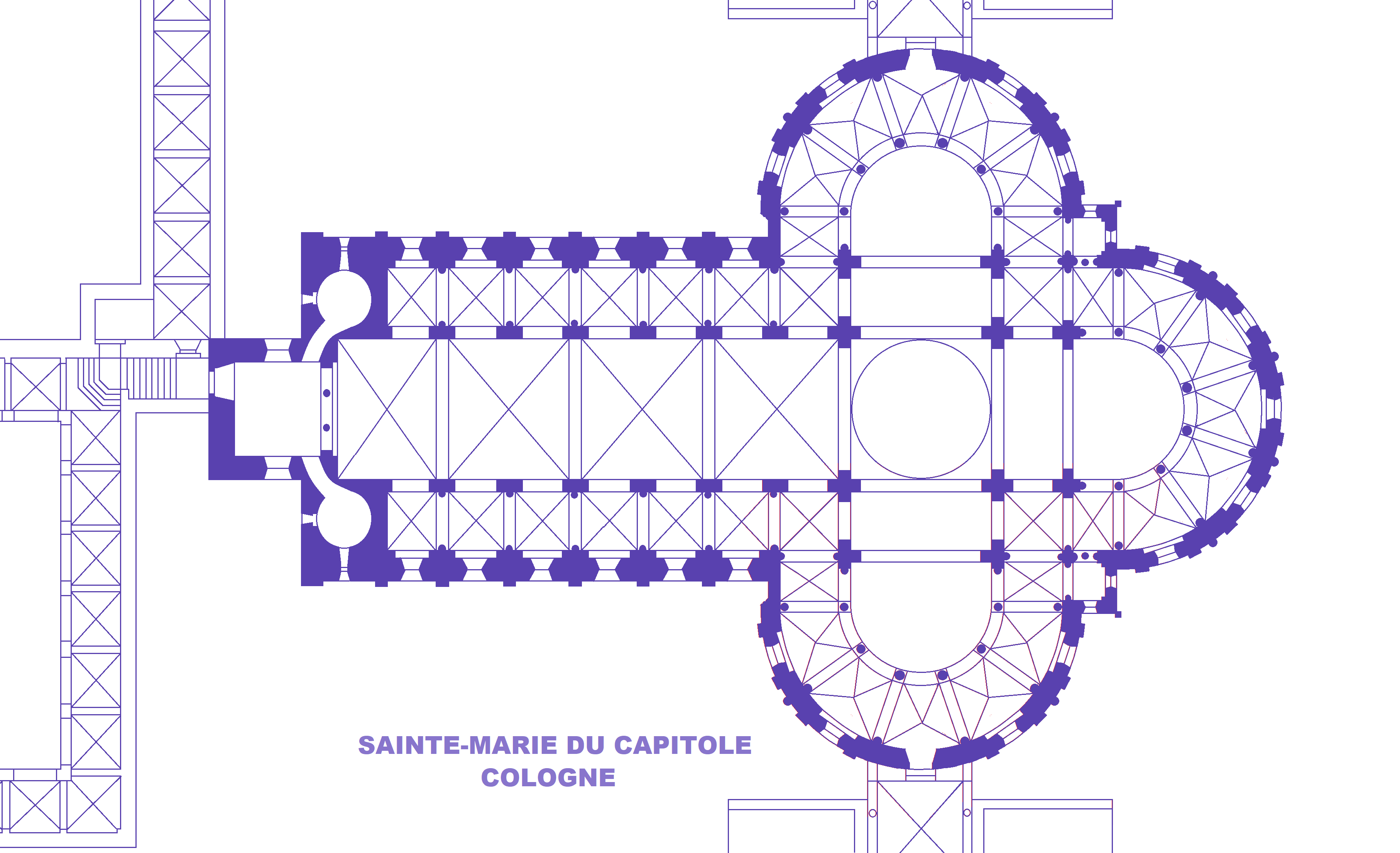 Cologne -Sainte-Marie du Capitole, Plan